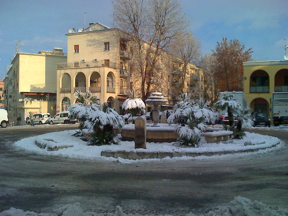 Piazza Clemente XI nel quartiere Primavalle durante la nevicata del 2012